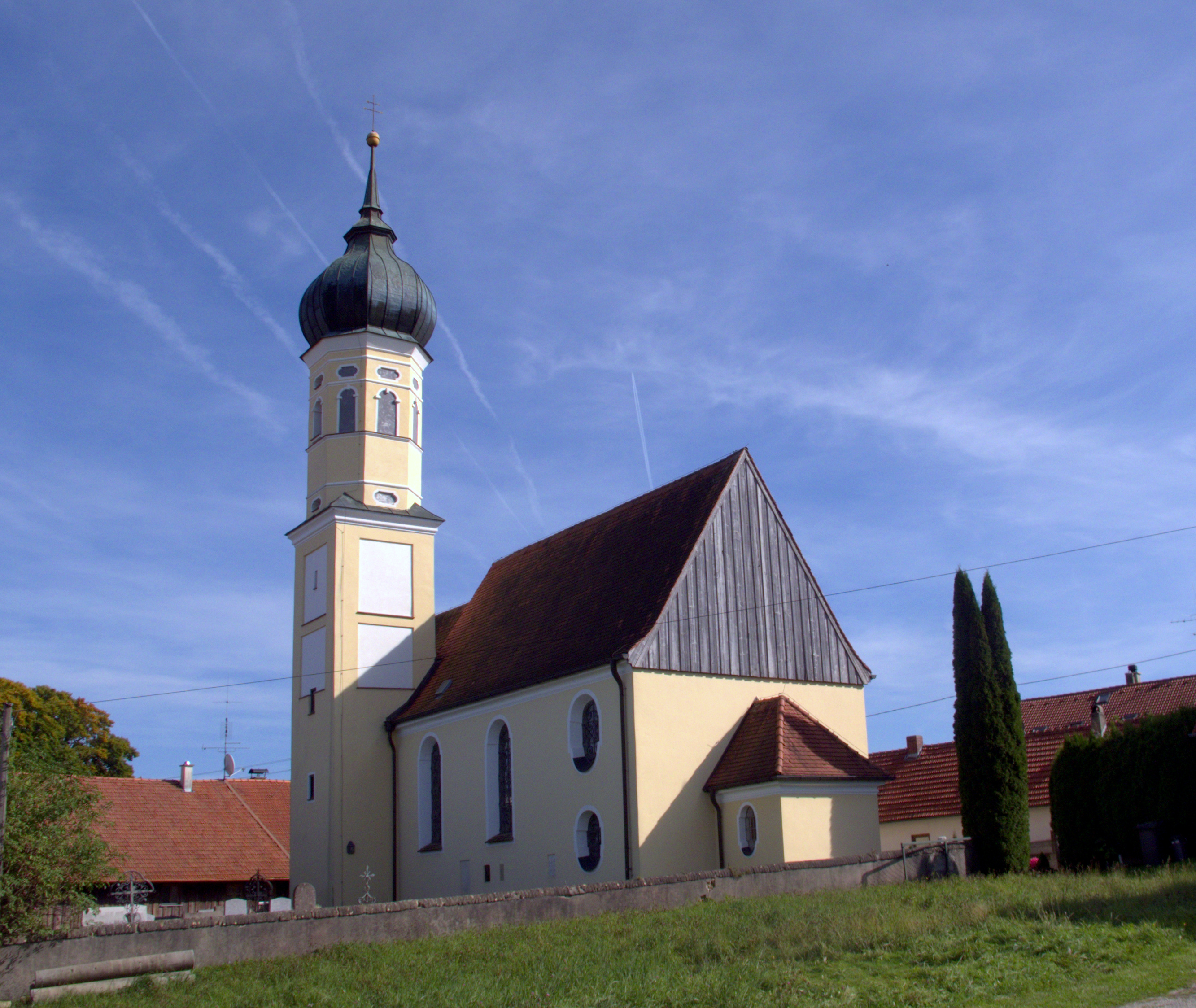 Saalbau mit eingezogenem Chor und Chorflankenturm, im Kern spätgotisch, Dachstuhl und Verlängerung 1721, Barockisierung des Turms 1730; mit Ausstattung; Friedhofsmauer auf der Nord-, Süd-, und Westseite, mit halbrunden Ziegeln gedeckt, 17./18. Jahrhundert